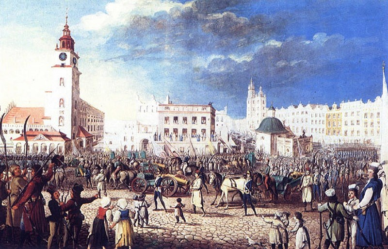 Wprowadzenie na rynek krakowski dział rosyjskich zdobytych pod Racławicami 4.04.1794 r. Gwasz z 1804 roku.